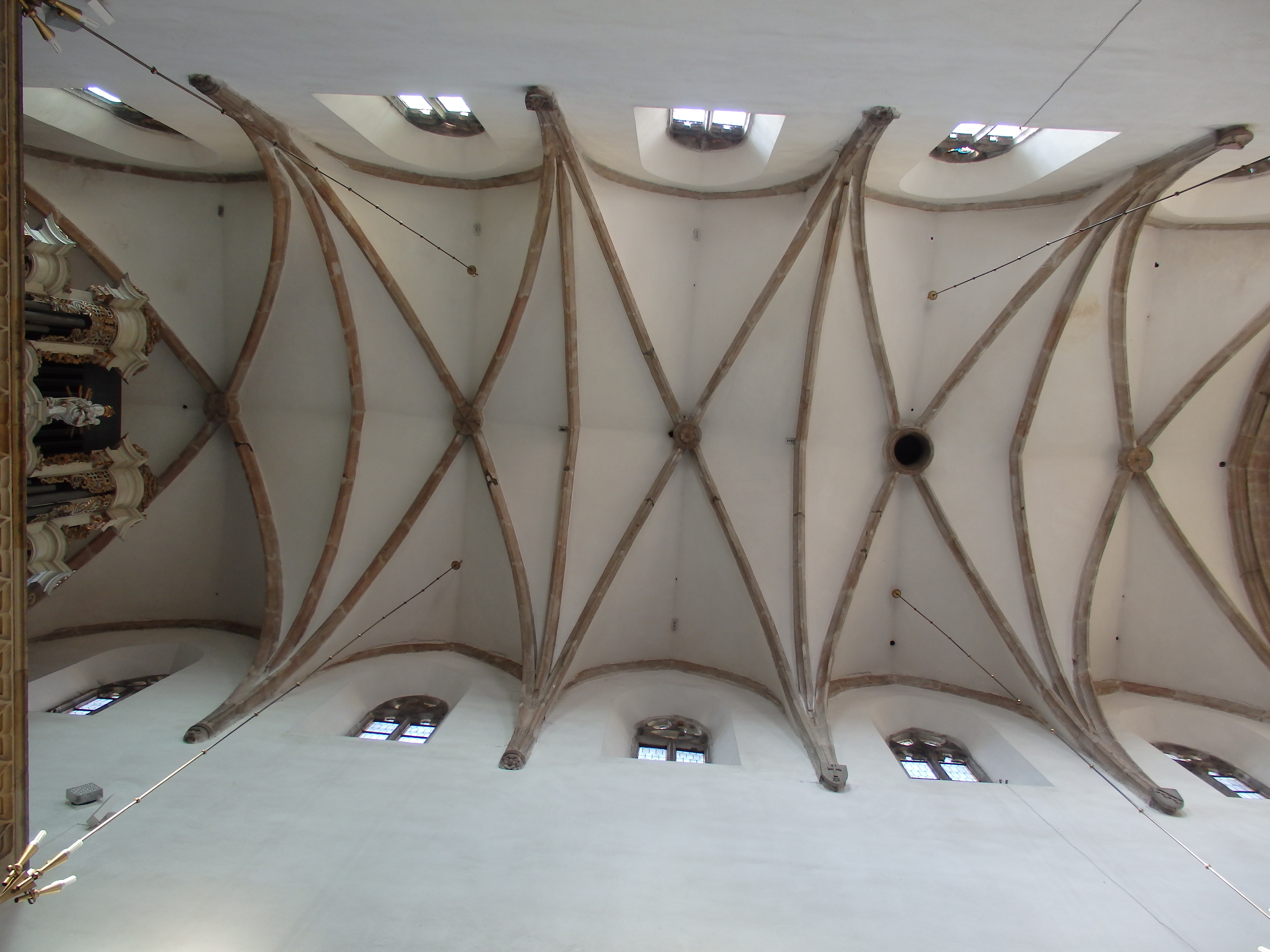 křížové žebrové klenby